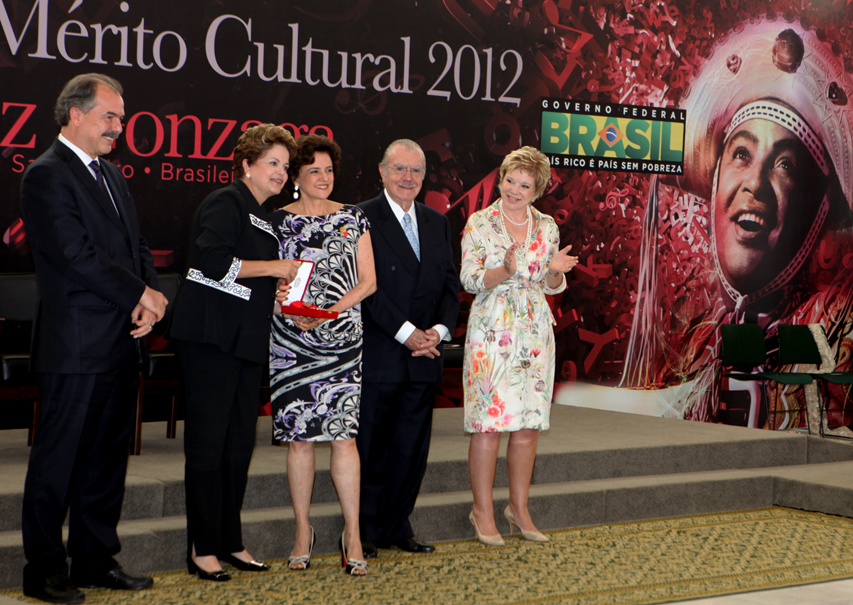 Marieta Severo sendo agraciada com a insígnia da Ordem do Mérito Cultural Foto: Elisabete Alves